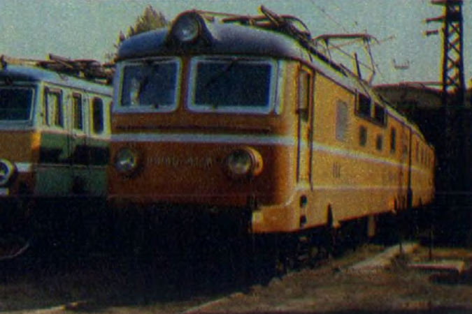 Dwuczłonowa lokomotywa elektryczna EP40-41 stoi na terenie lokomotywowni Warszawa Olszynka Grochowska.